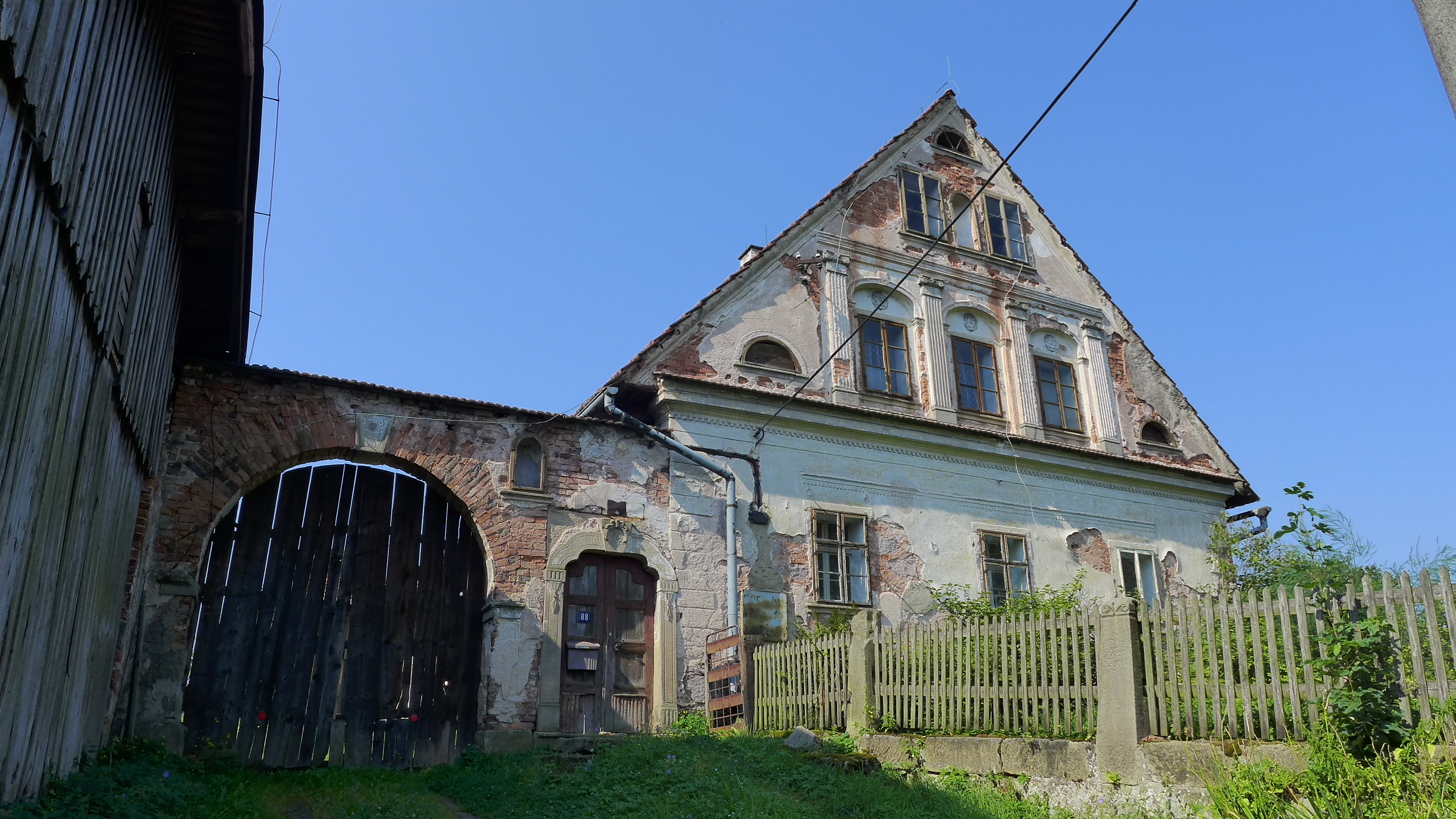 Usedlost čp. 88, Hejtmánkovice 88, Hejtmánkovice.